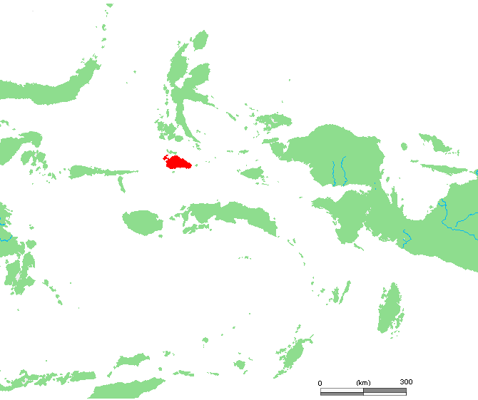 ID Obi.PNG